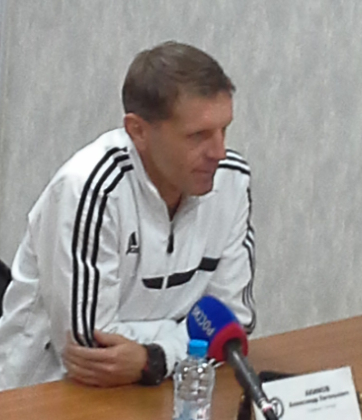 тренер Александр Акимов